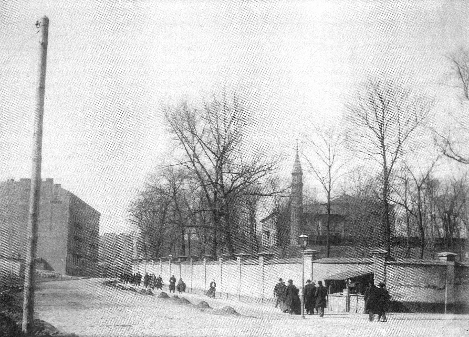 Ulica Książeca i ogród na Książęcem w Warszawie